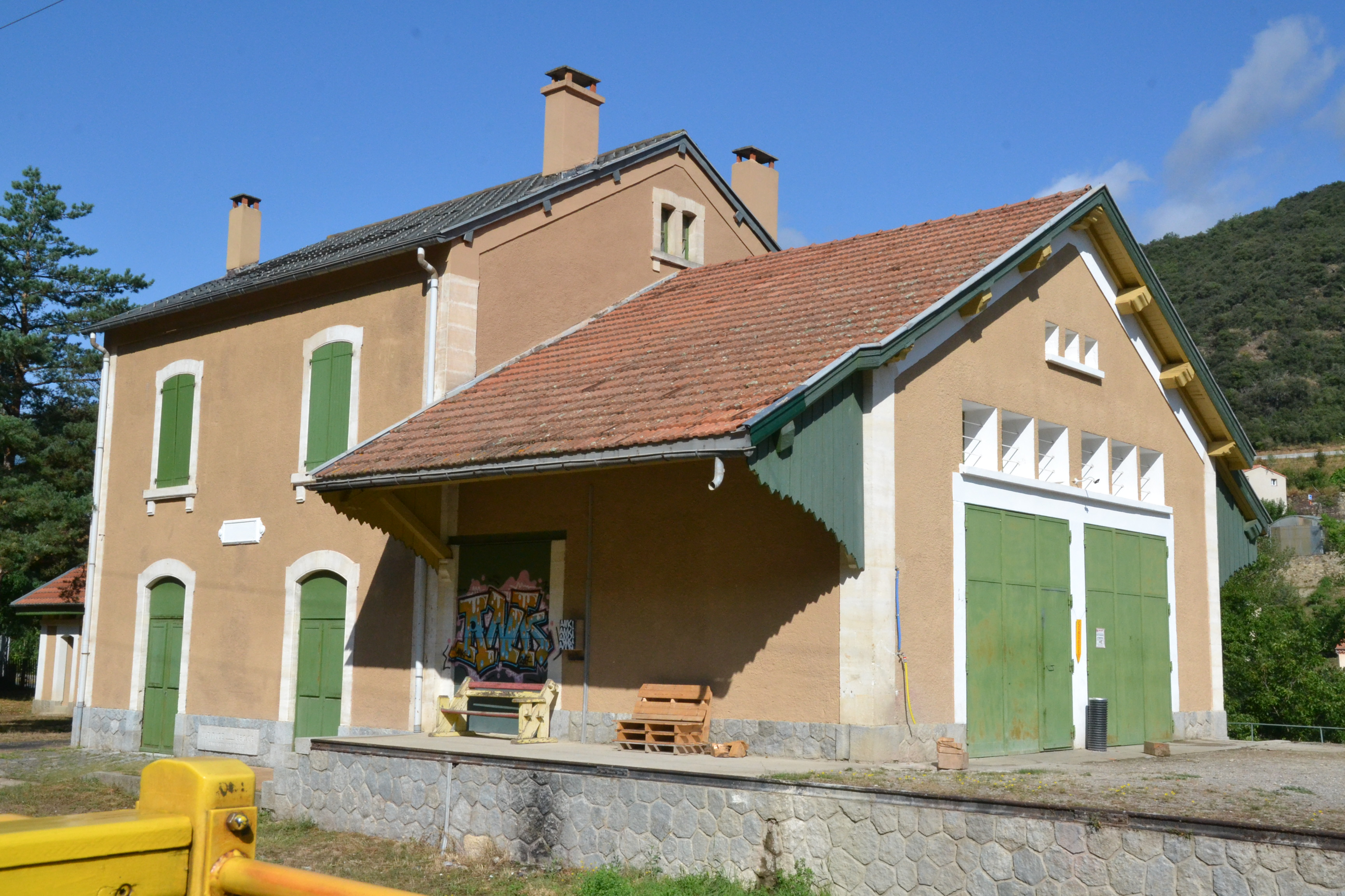 Gare de Joncet, sur la ligne de Cerdagne (commune de Serdinya, Pyrénées-Orientales, France).